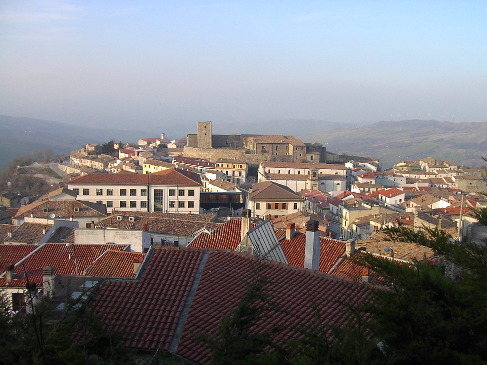 Bisaccia1